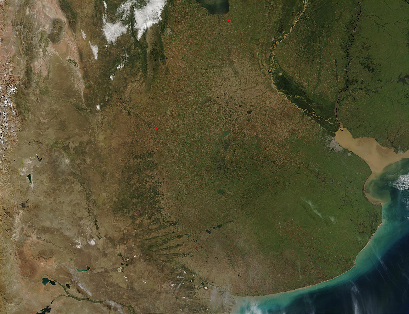 Provinz Buenos Aires Rio de la Plata Argentinien NASA Eine größere Version des gleichen Bildes gibt es auf der angegebenen Internetseite.